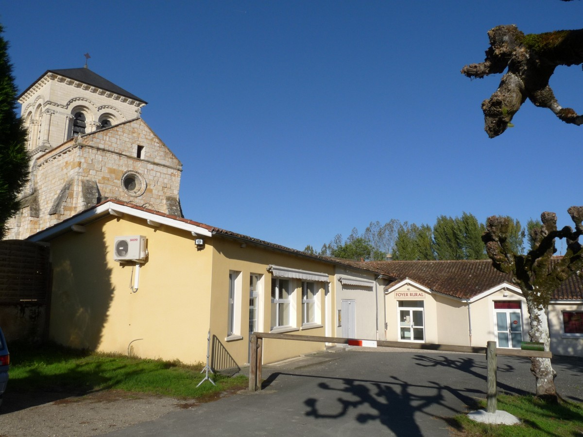 Foyer, Chepniers, Charente-Maritime, France